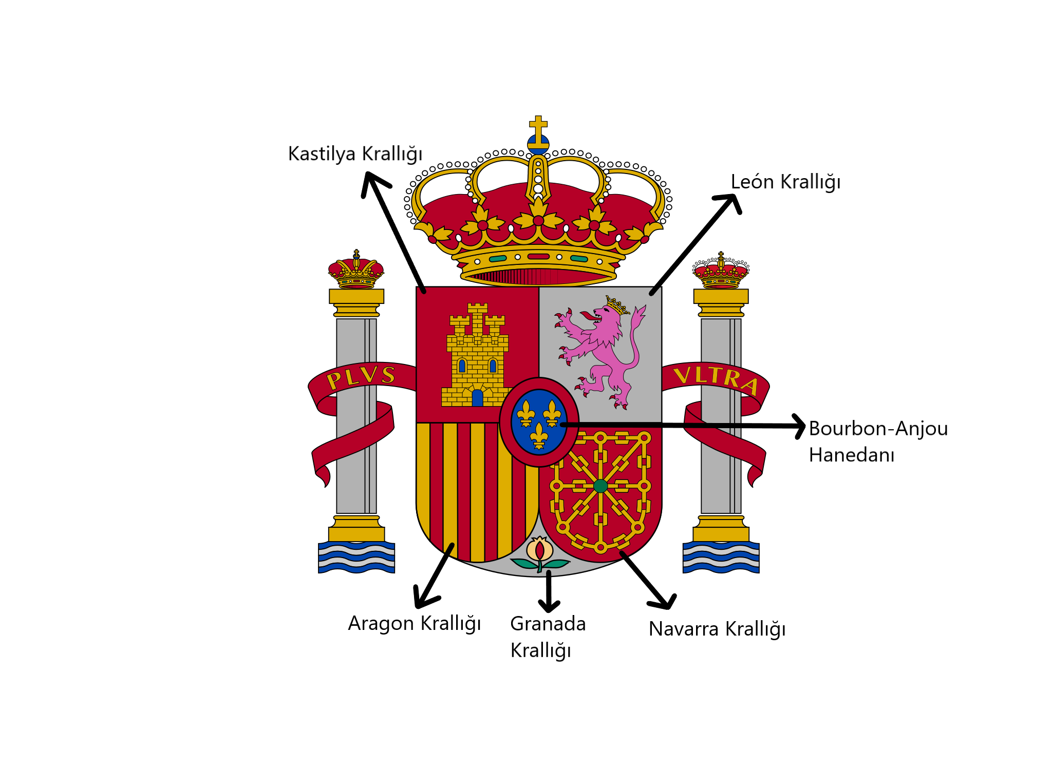 Arma açıklaması